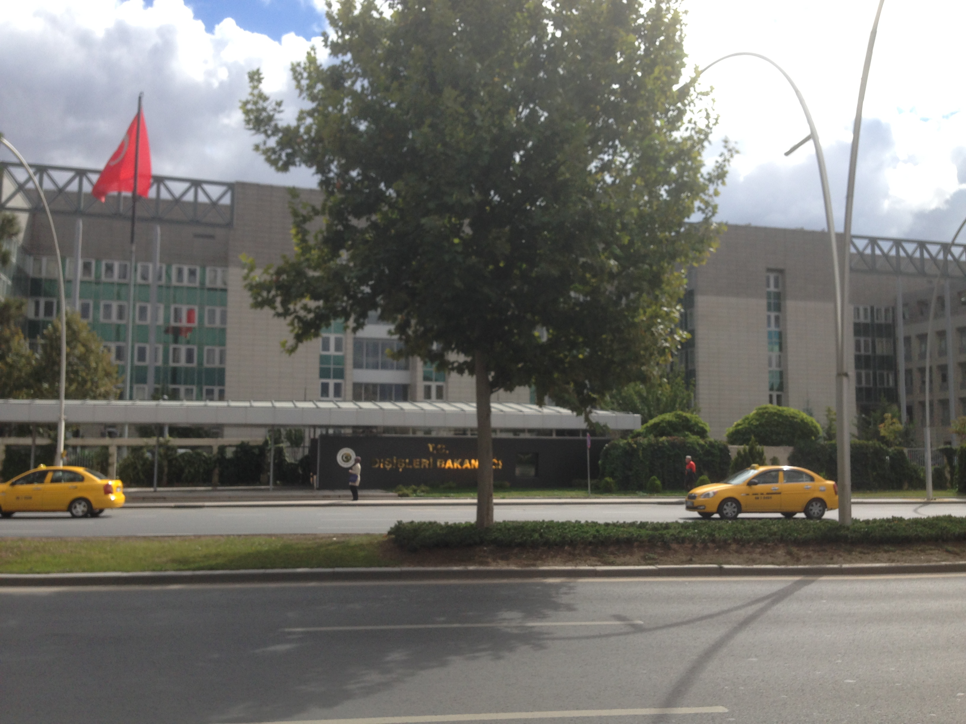 Türkiye Dışişleri Bakanlığı Binası, Ankara